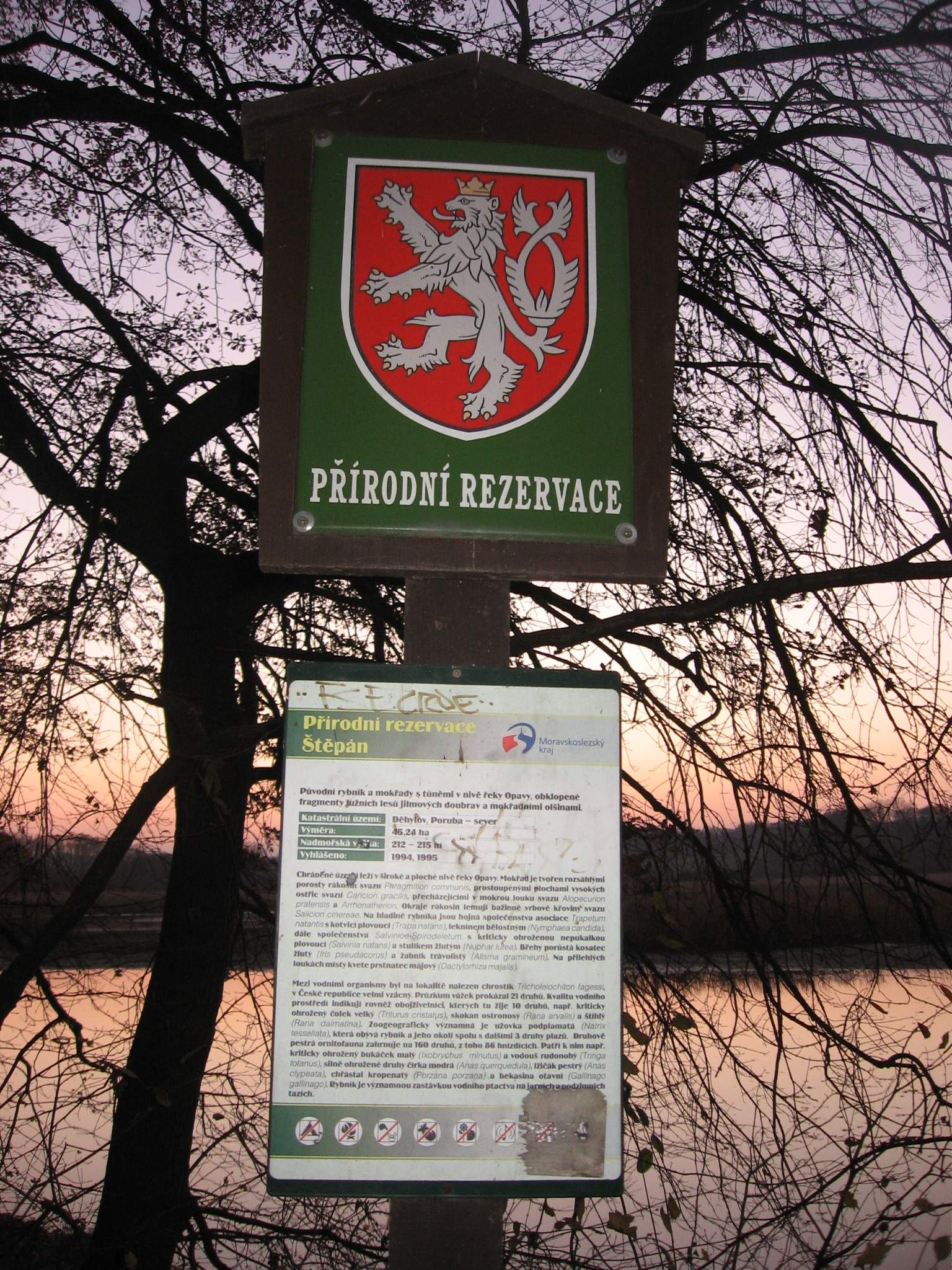 Tabule se státním znakem v PR Štěpán (na hrázi)